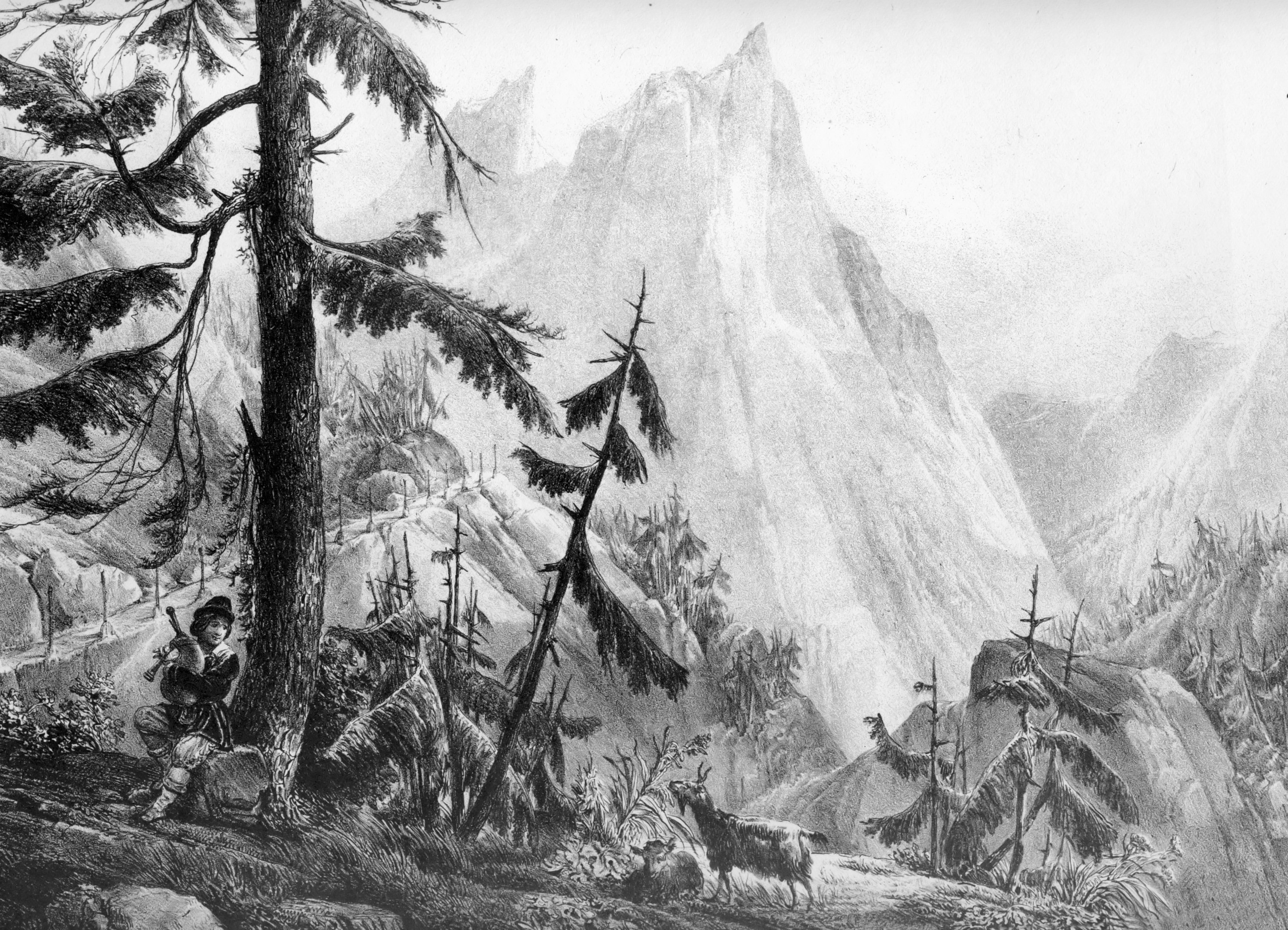 Montagnes du Jura